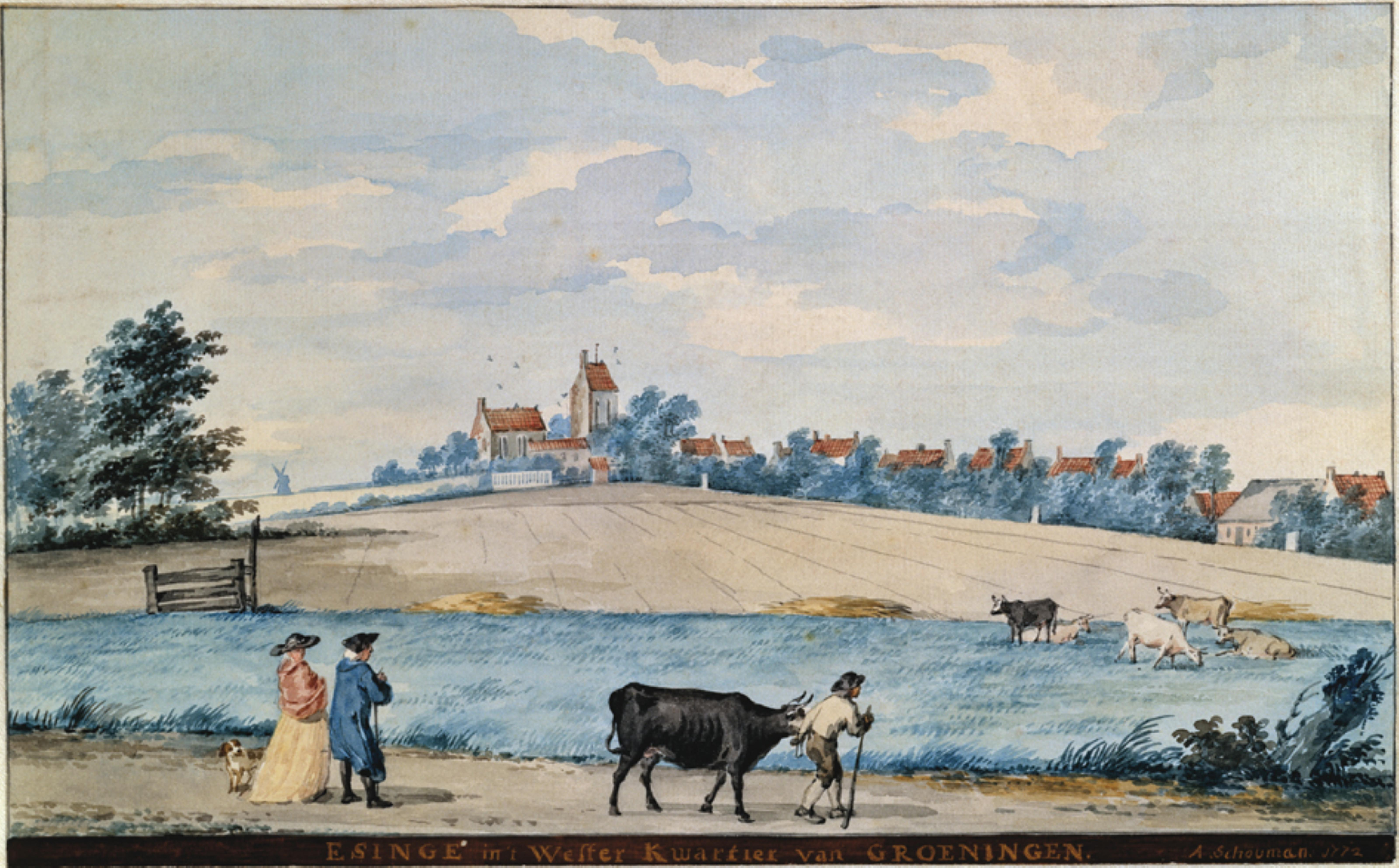 Ezinge in het Westerkwartier van Groningen